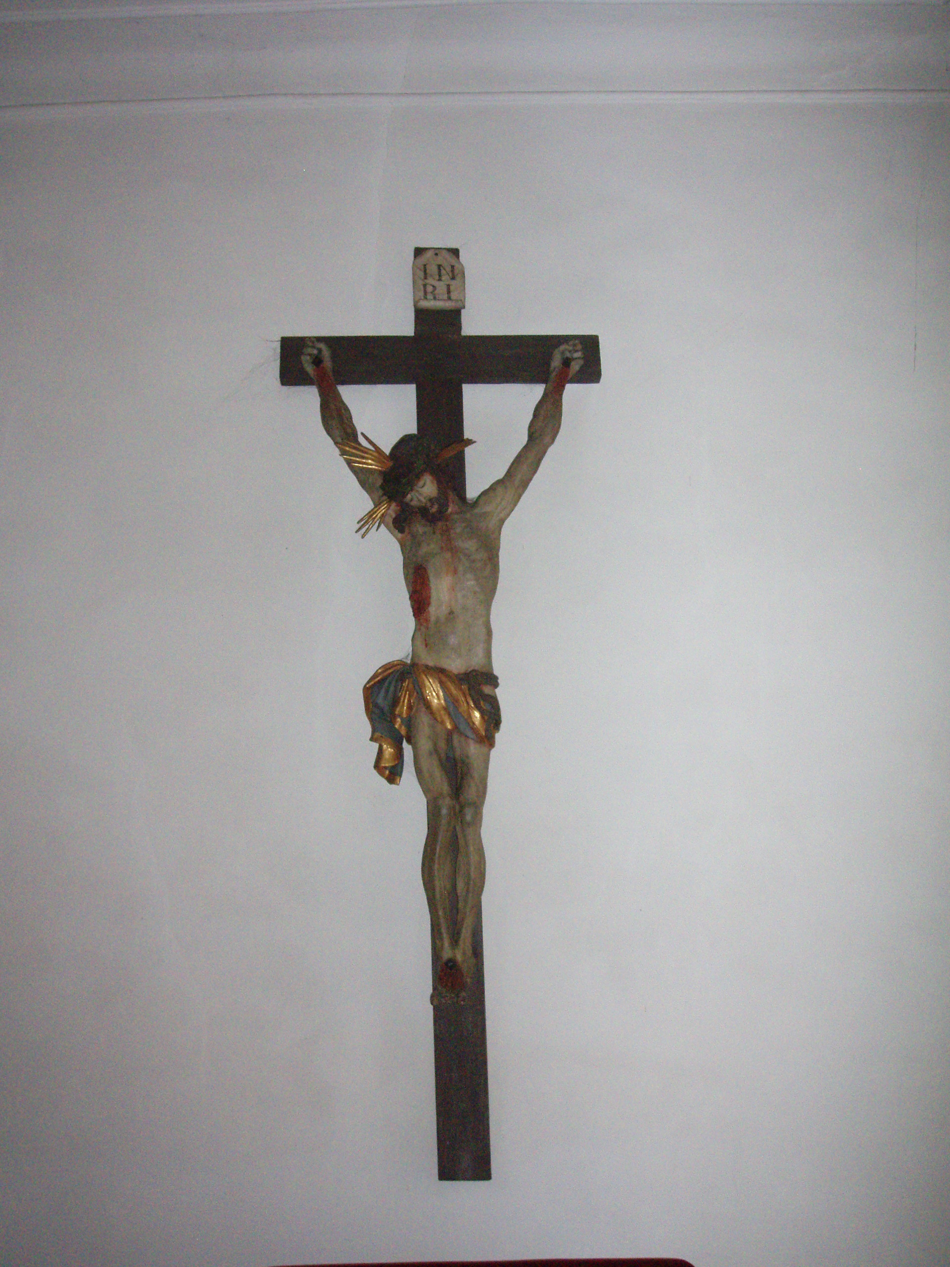 Gekreuzigter, St. Martin in Langenargen